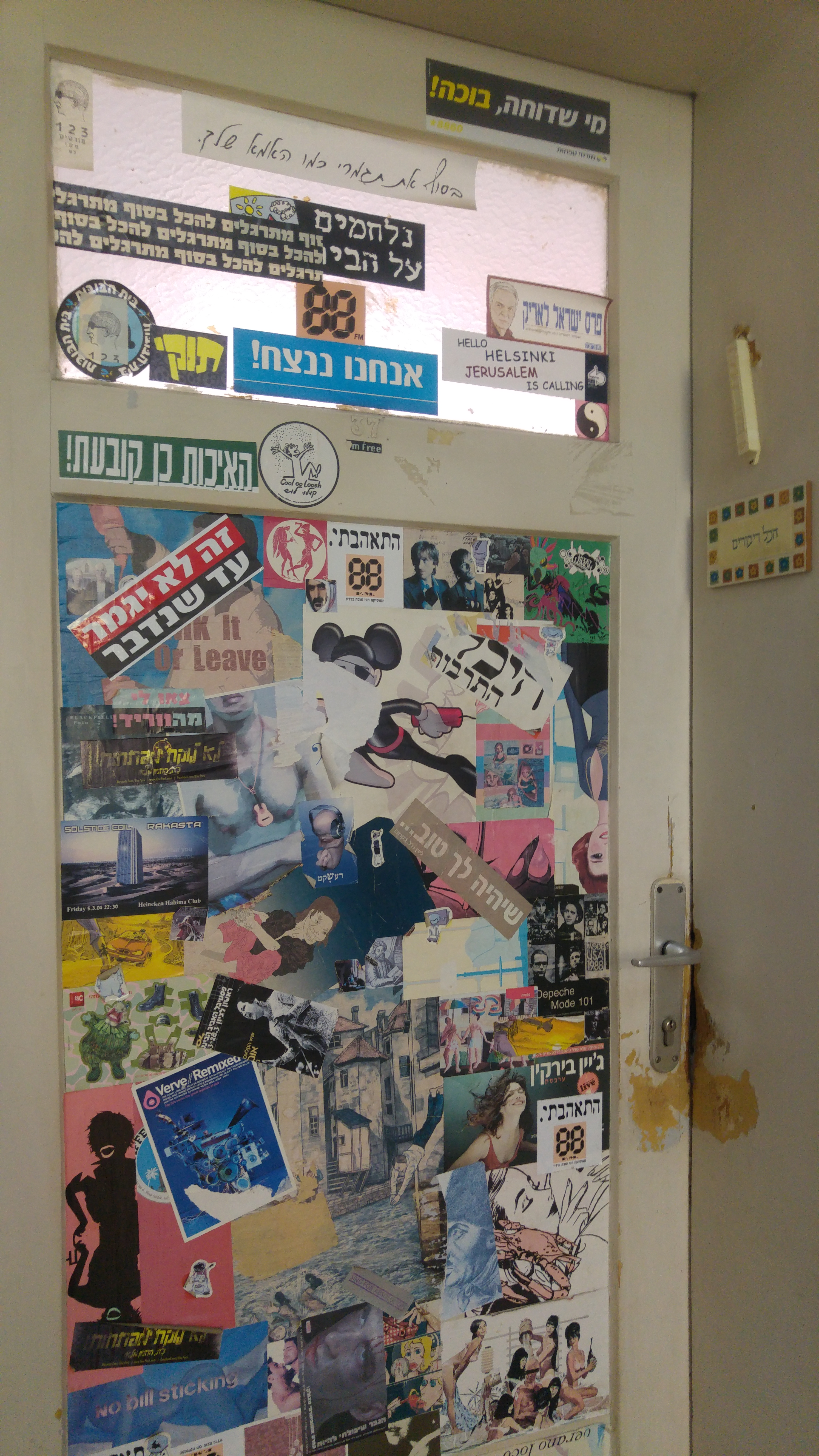 מתחם רשות השידור בתל אביב, ליד הקריה ומתחם שרונה.